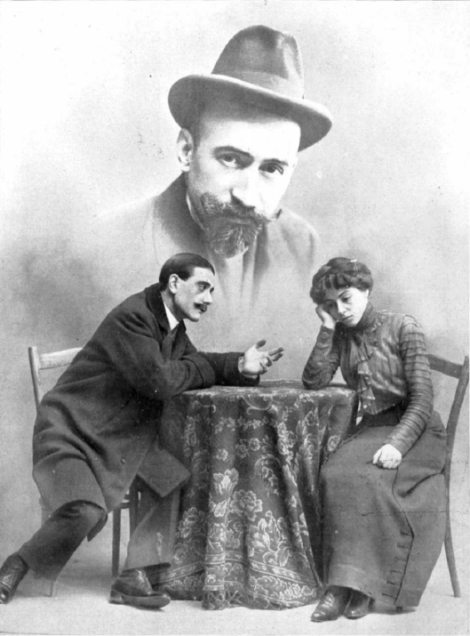 Composición fotográfica publicada en 1911 con motivo de la obra teatral La losa de los sueños, del escritor español Jacinto Benavente. En la parte de abajo se puede ver a los actores Alfonso Muñoz y Catalina Bárcena en una escena de la obra. Arriba, la imagen de Benavente.